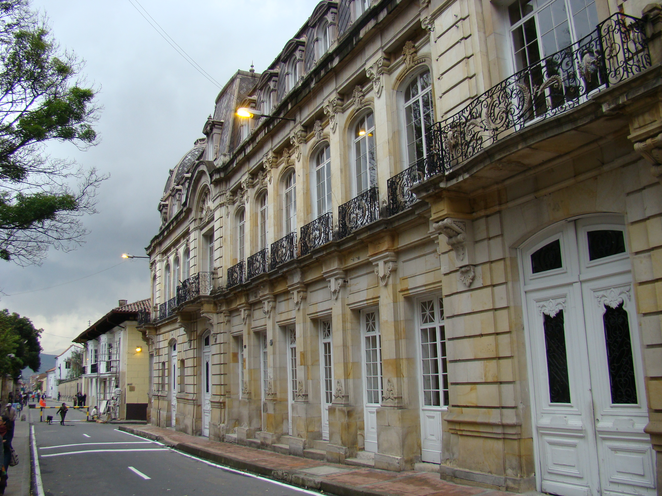 Otro costado de la Casa de Nariño